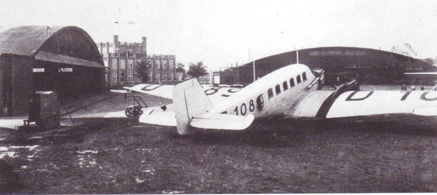 Fotografie des Königsberger Flughafens Devau